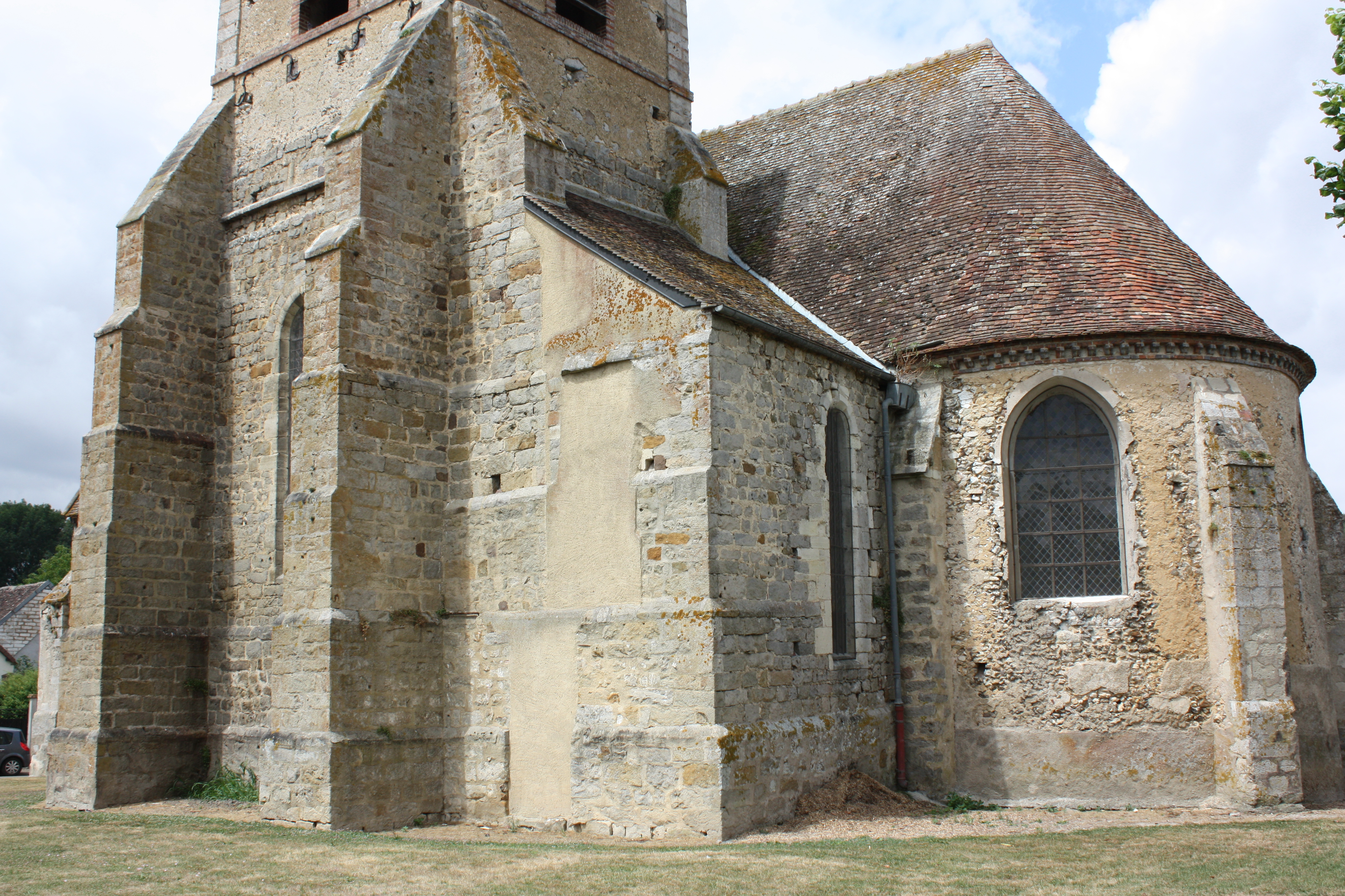 Chevet vu du Sud-Est